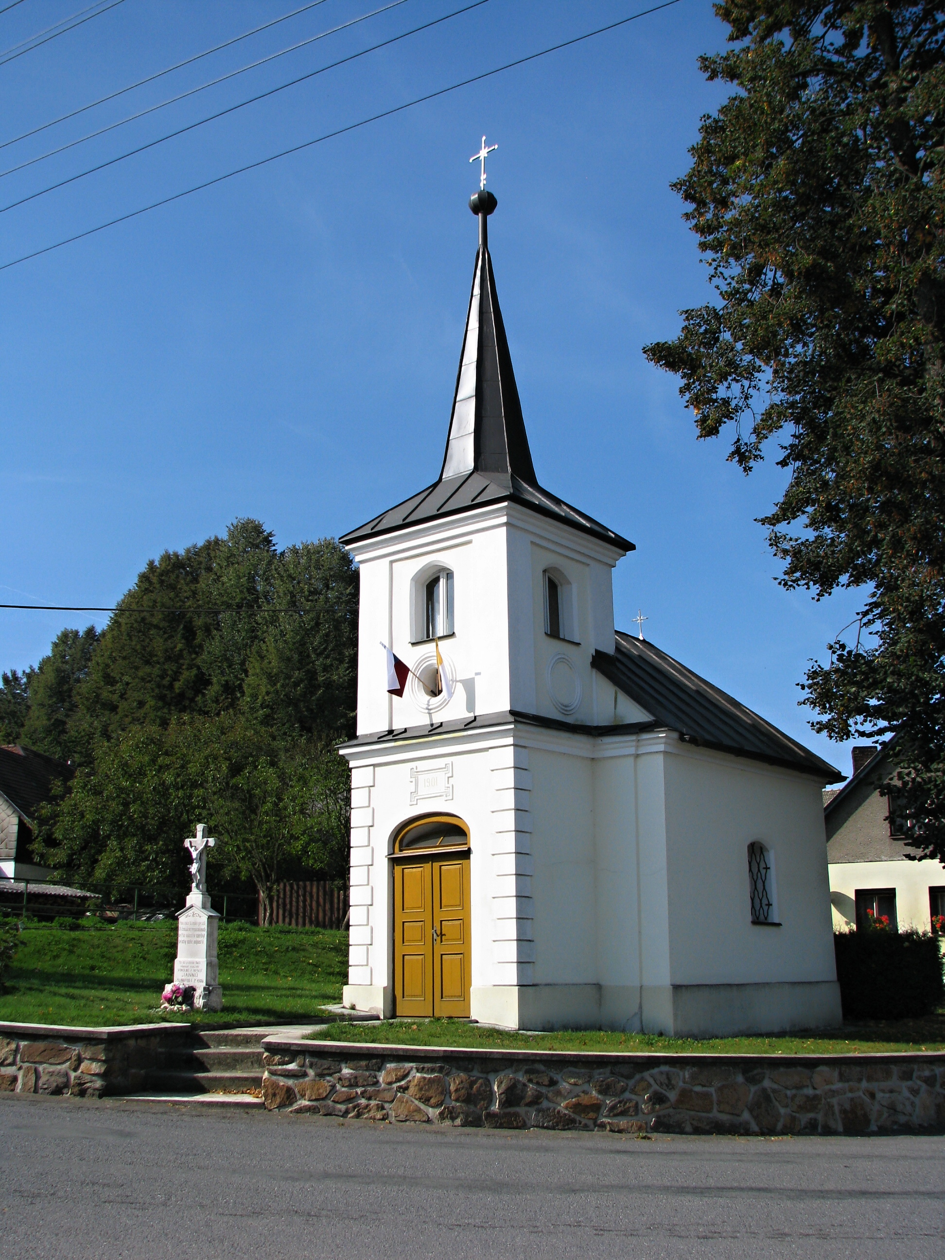 Hlinné (Nové Město na Moravě)